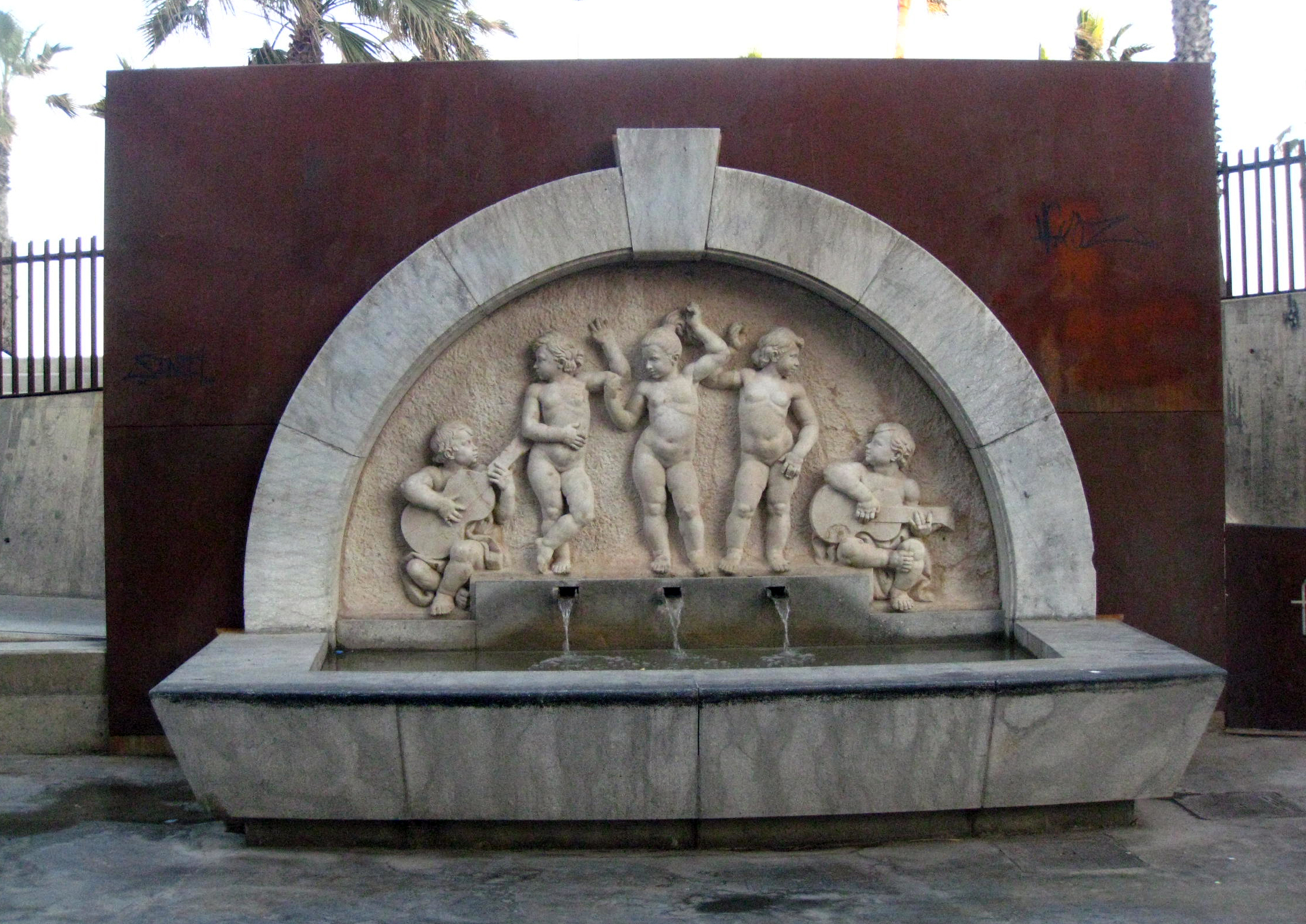 Font Carmen Amaya (Rafael Solanich). Pl. Brugada (Barcelona)